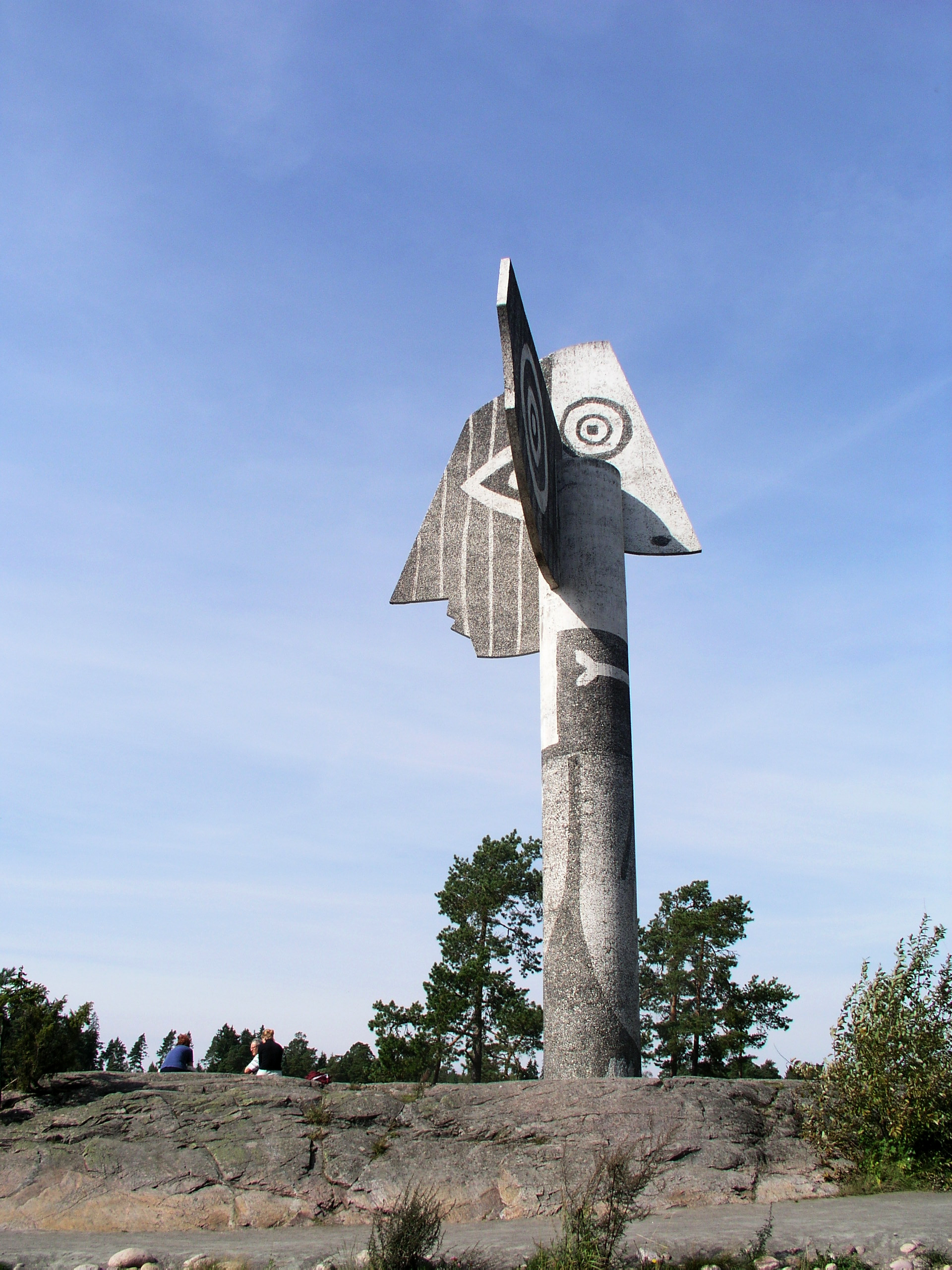 Picasso statue on Strandudden, Kristinehamn, Sweden